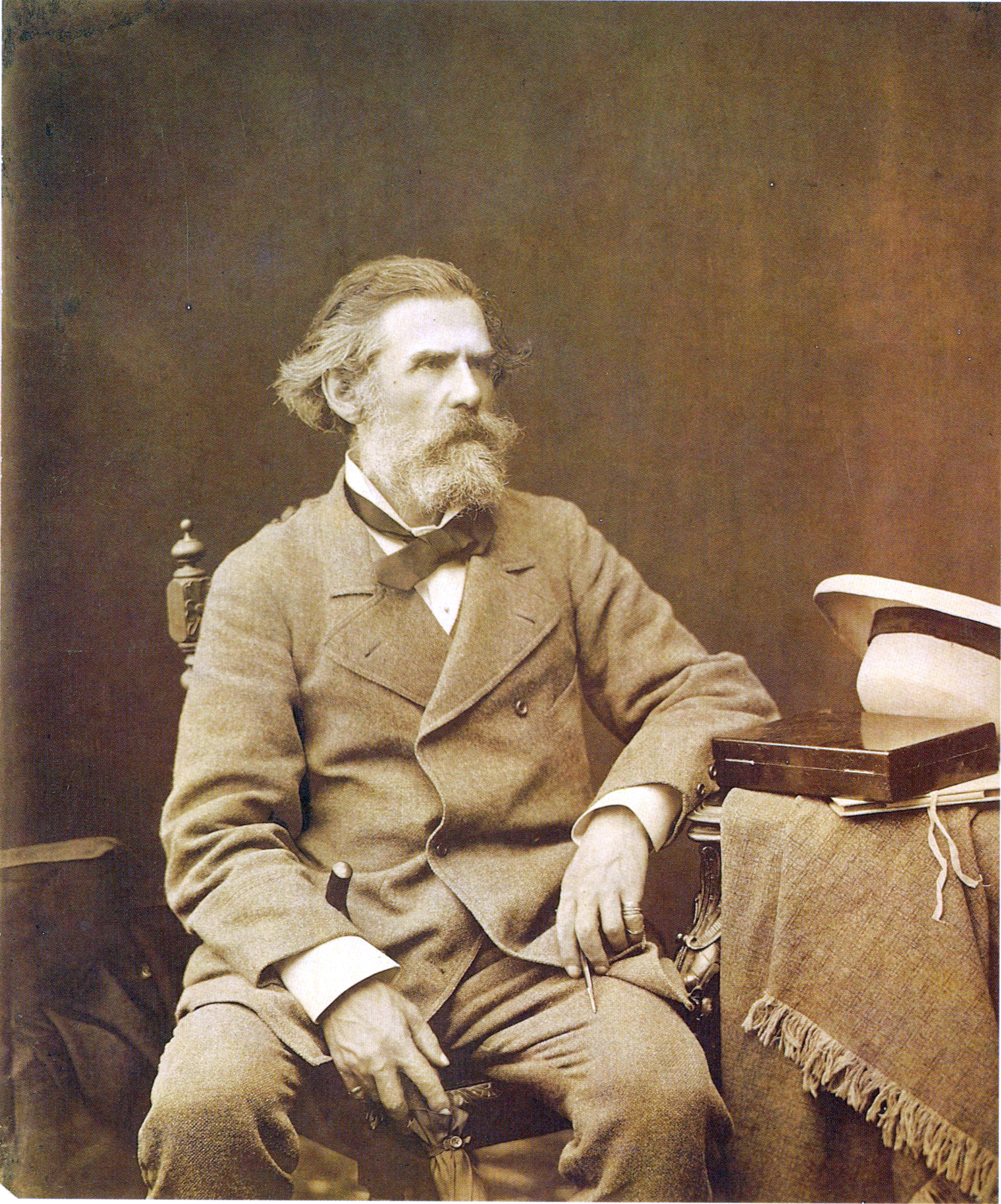 Боголюбов, Алексей Петрович